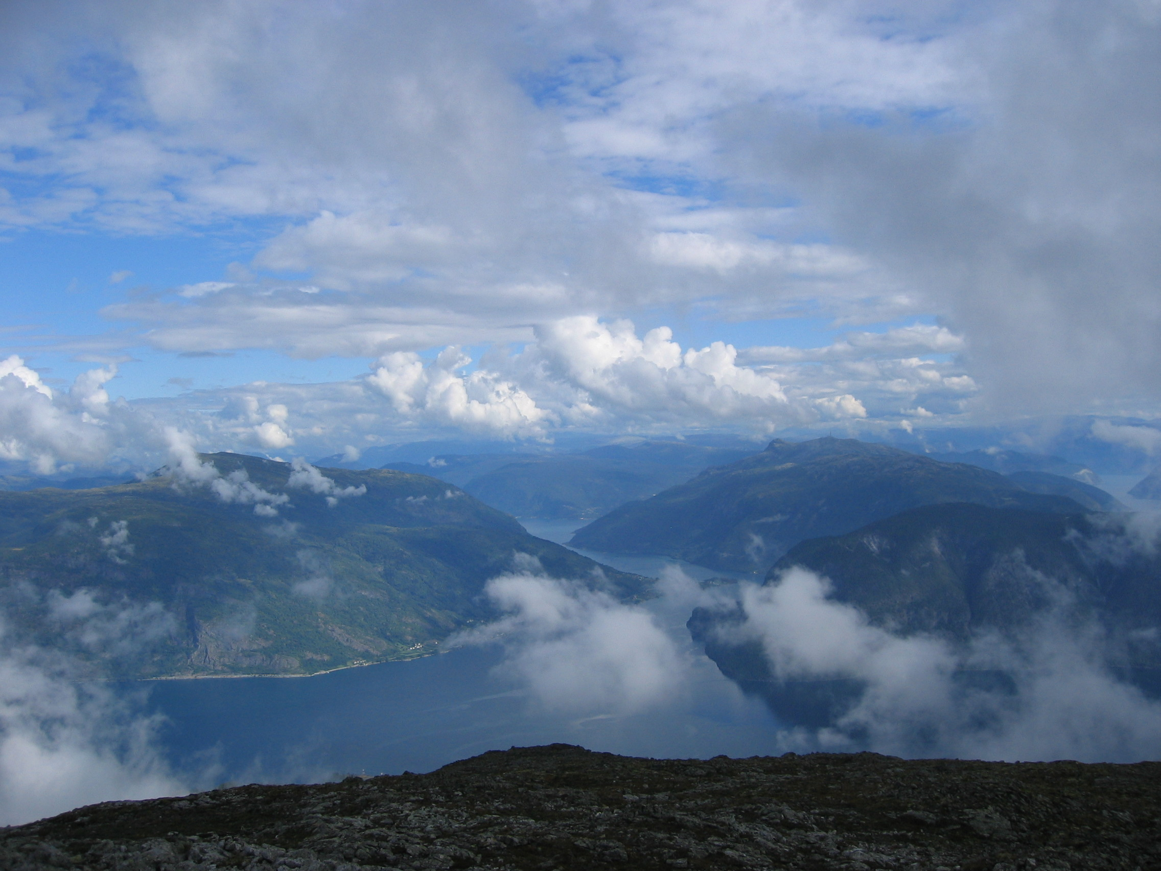 Utsikt mot Norafjorden, Fimreite til høgre på hi sida av Sognefjorden, Norane på venstre side.